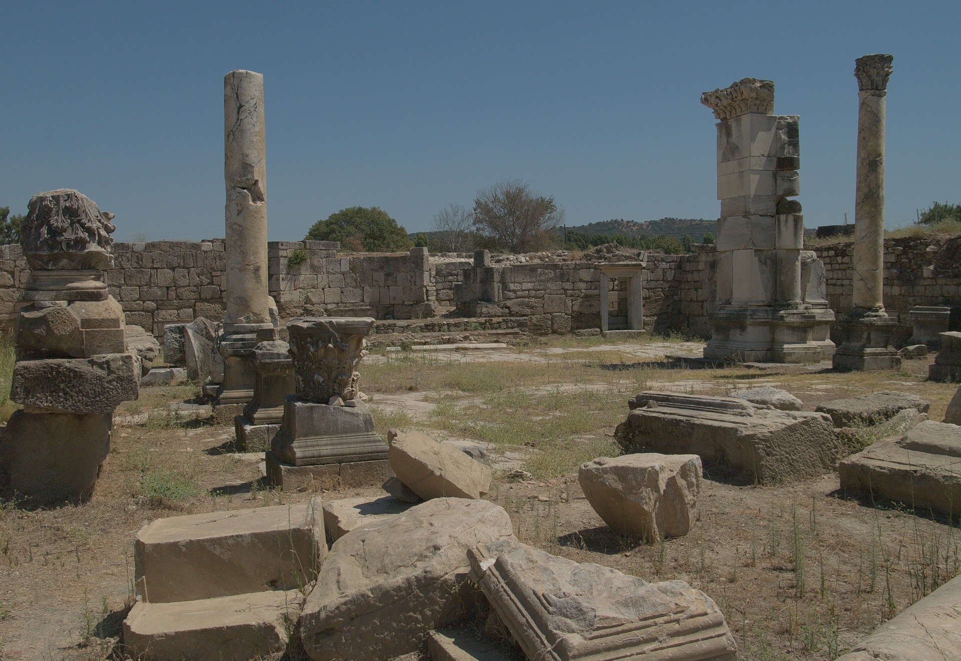 Магнесия на Меандре. Византийская базилика